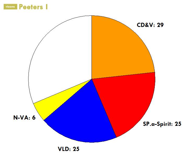 peetersI met NVA (voor sep08)